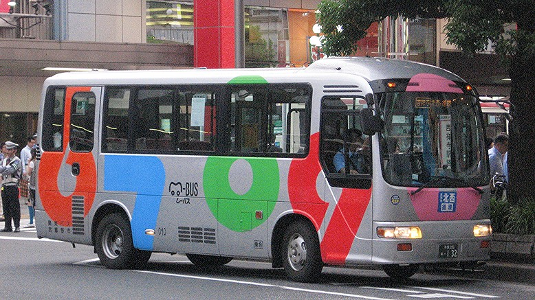 武蔵野市のコミュニティバス「ムーバス」。この車種は吉祥寺北西循環のもの（日野・リエッセ）。